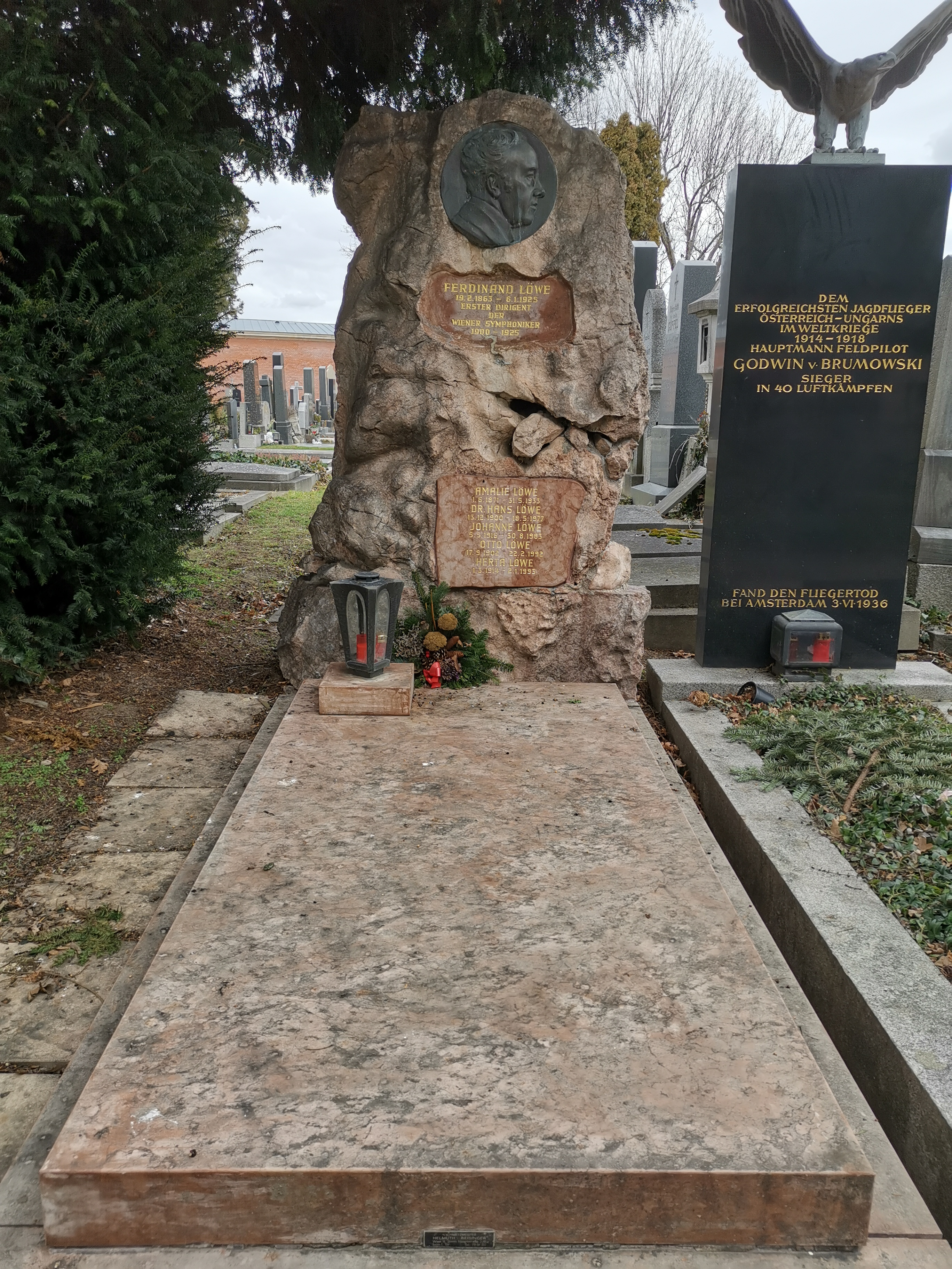 Grab von Ferdinand Löwe auf dem Wiener Zentralfriedhof